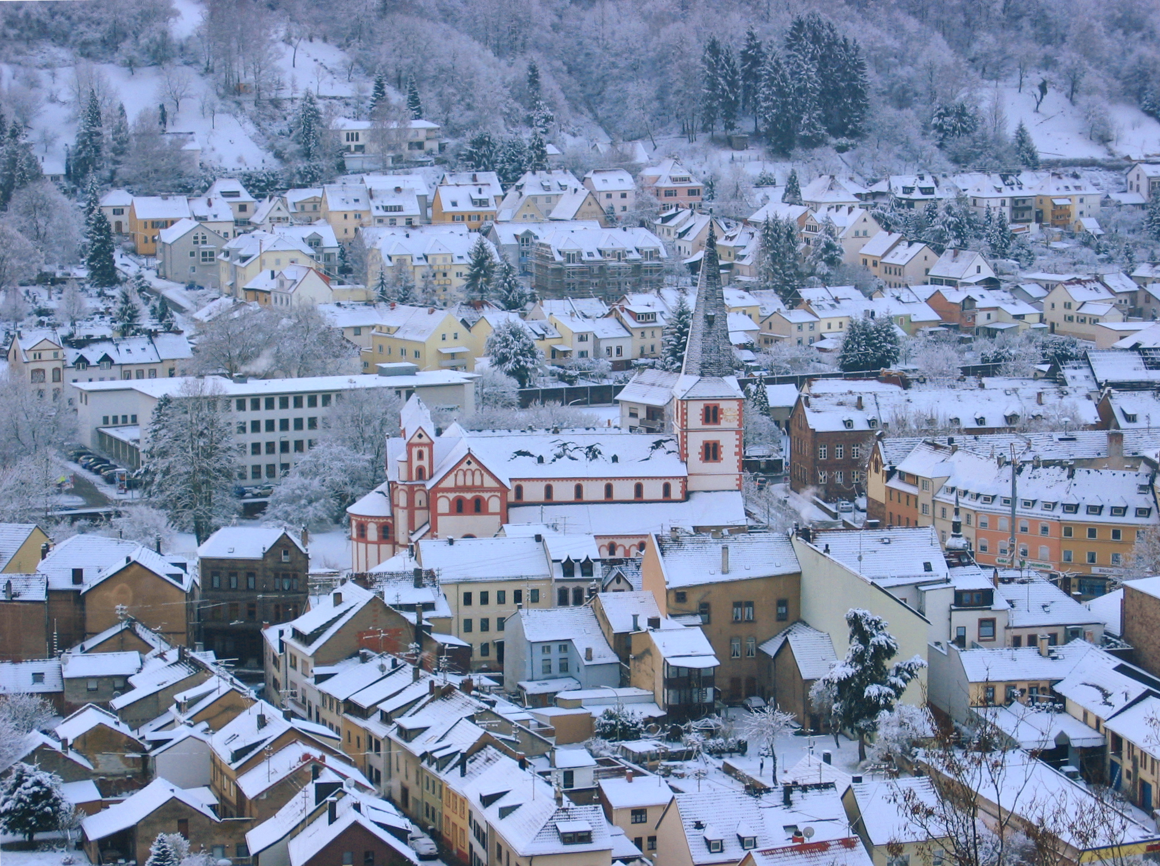 St. Peter in Merzig vom Kreuzberg aus gesehen